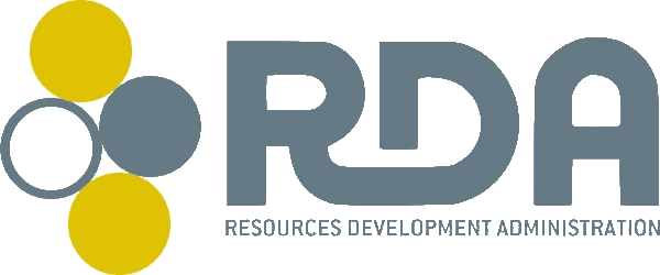 Logo de la Resources Development Administration (RDA).